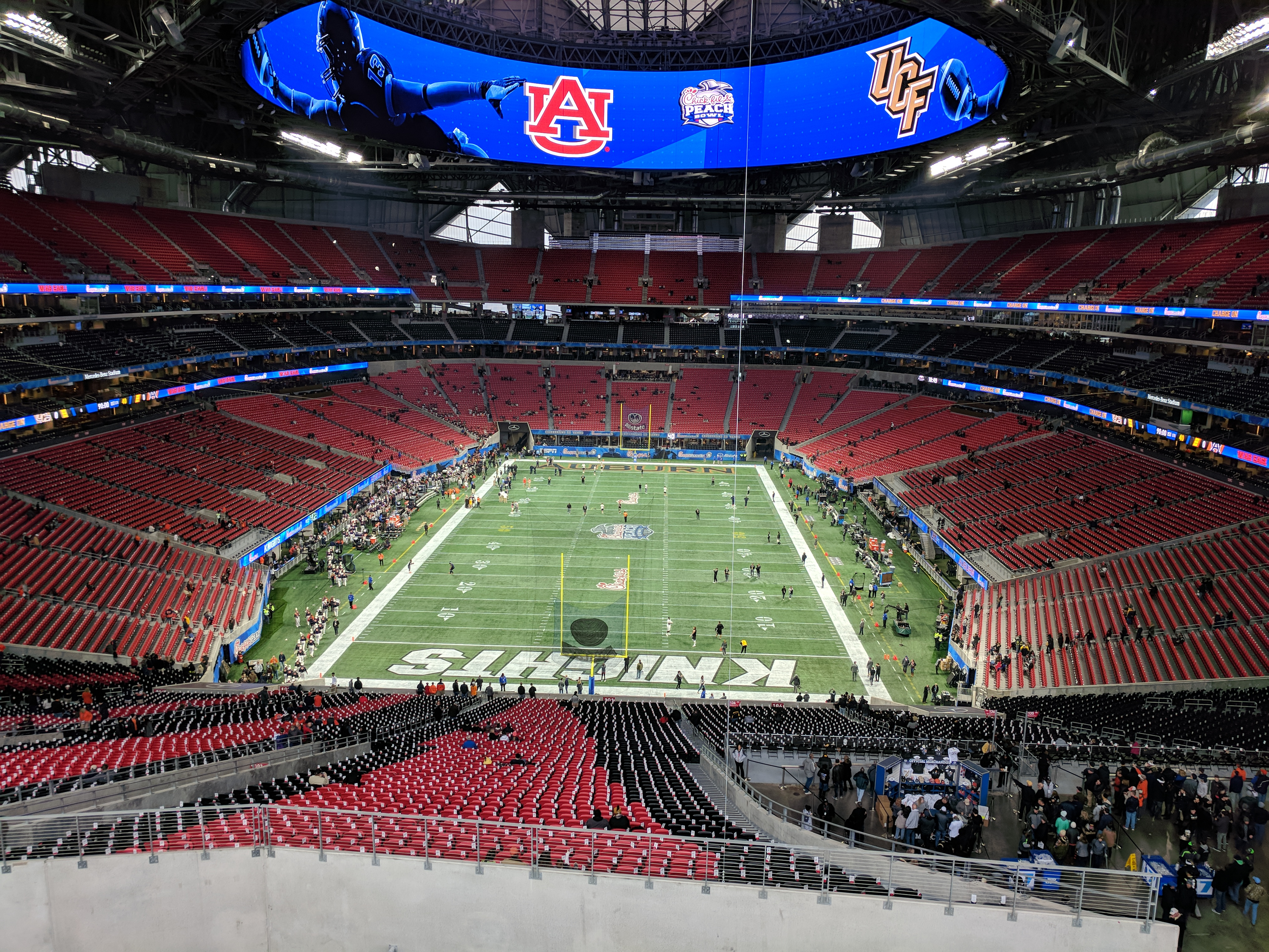 200 Level skybridge